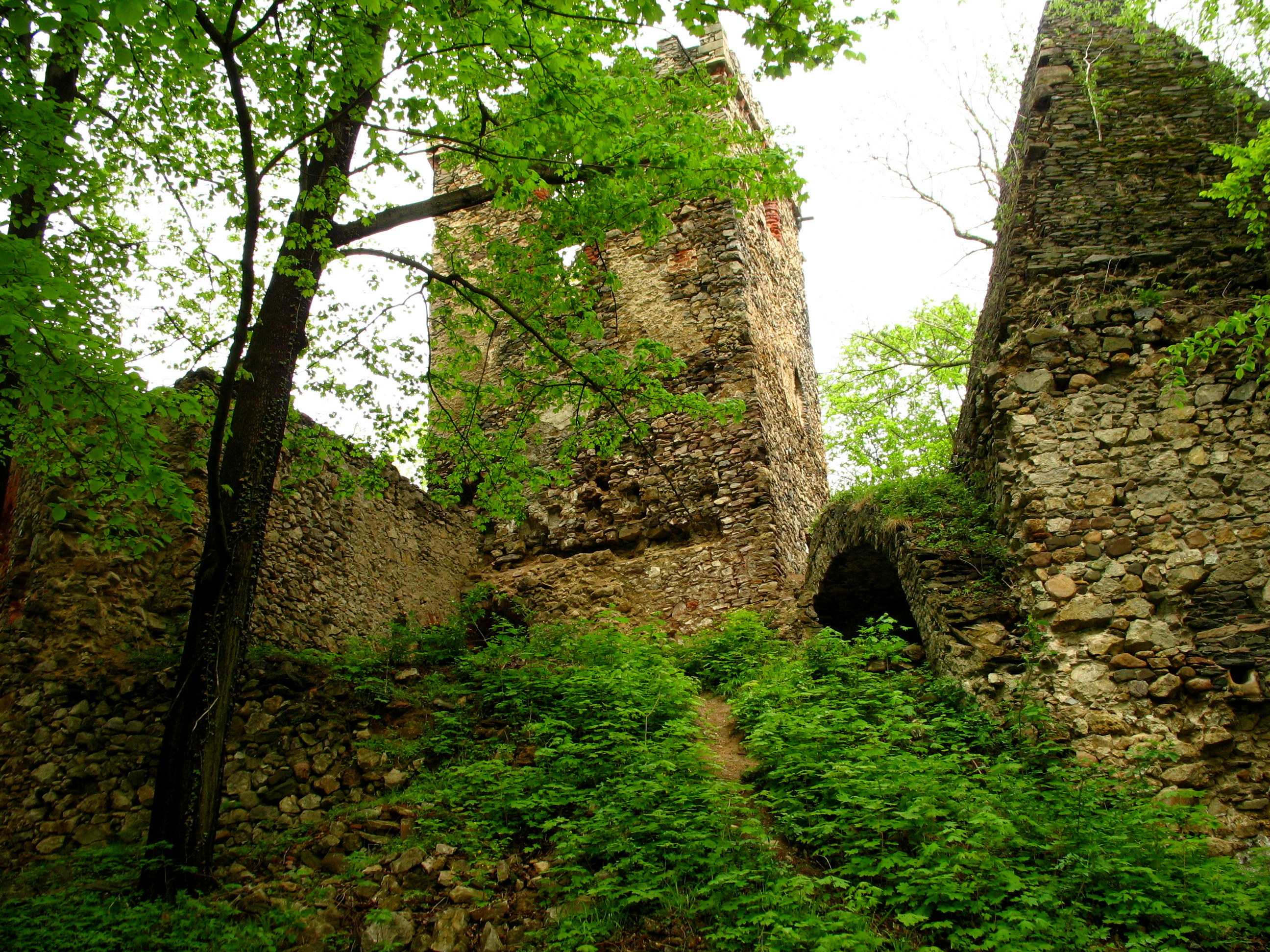 Lipa Górna - zespół zamkowy, XIII-XVII: - ruiny zamku, - budynki przedzamcza, - park, pocz. XX (zabytek nr rejestr. A/3053/751 z 26.09.1960)